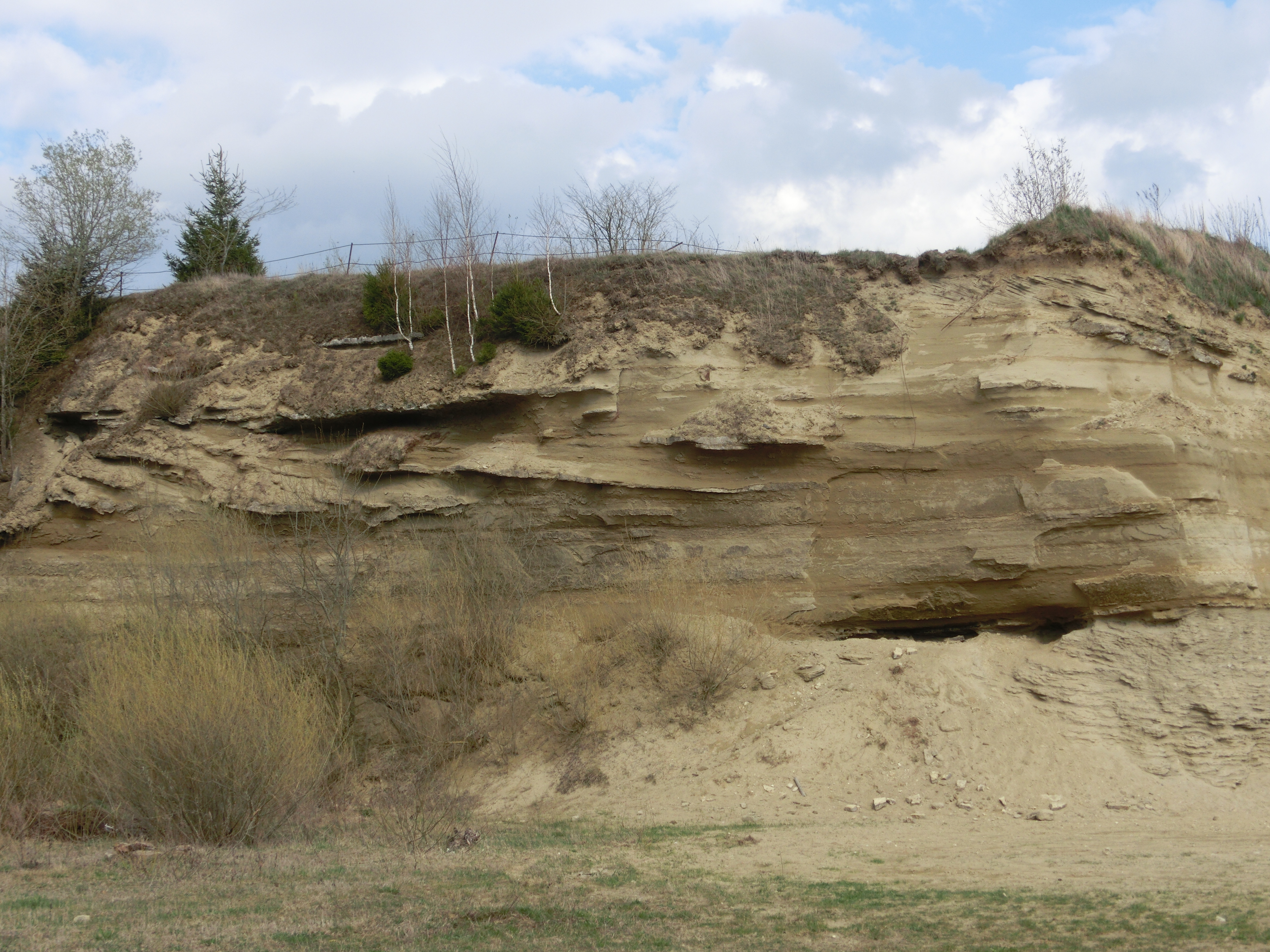 Deutschland (D) - Baden-Württemberg (BW) - Landkreis Sigmaringen (SIG) - Hohentengen: Geotop und Naturdenkmal "Sandgrube Gertenstock"